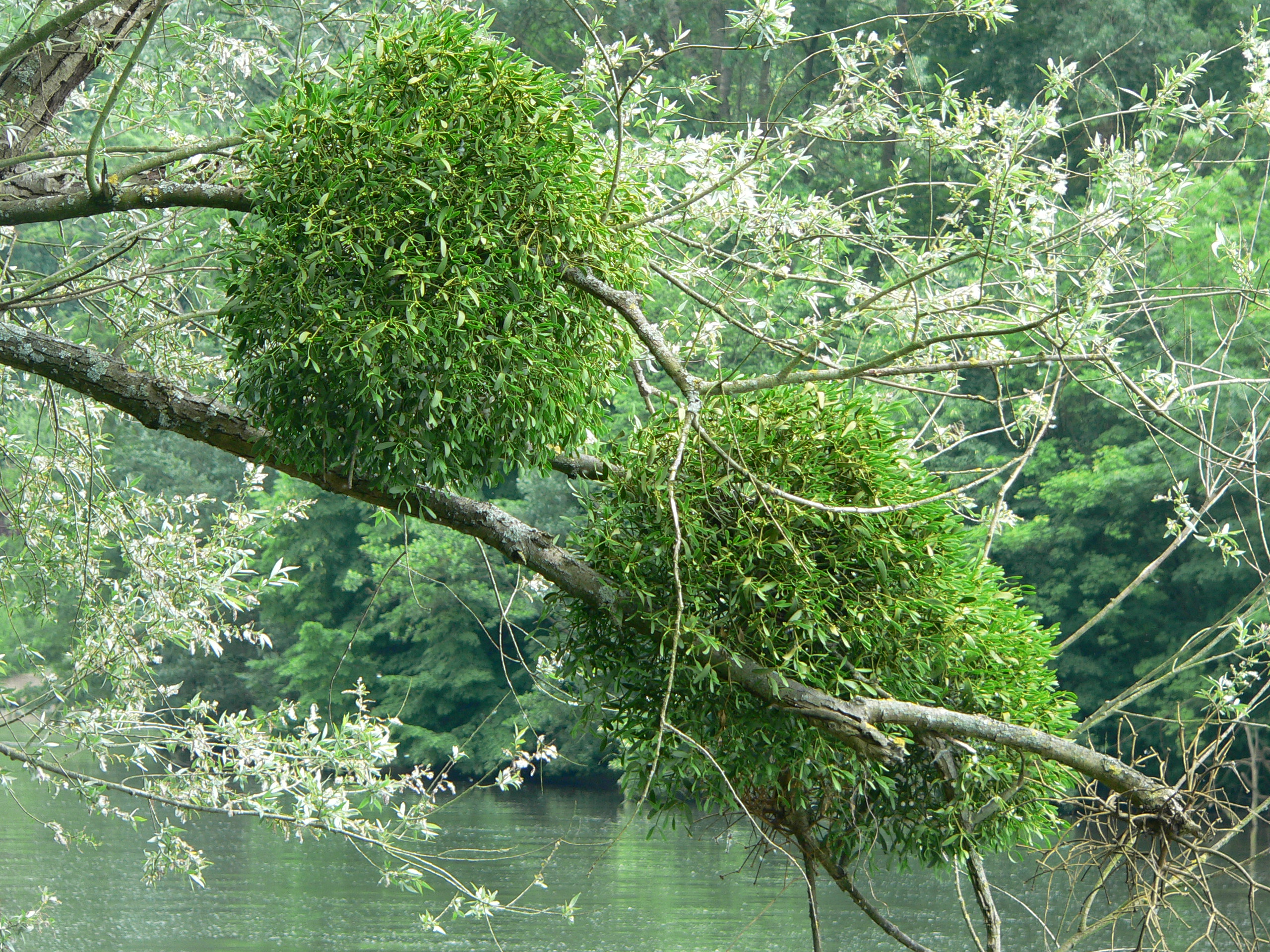 Viscum album 2007 David Monniaux